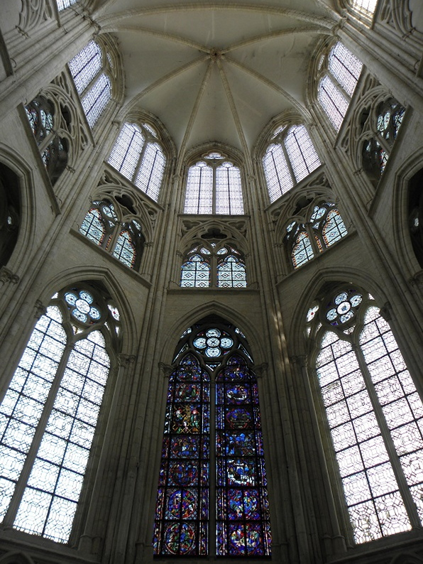 Chœur de l'église de Saint-Sulpice-de-Favières (91). .